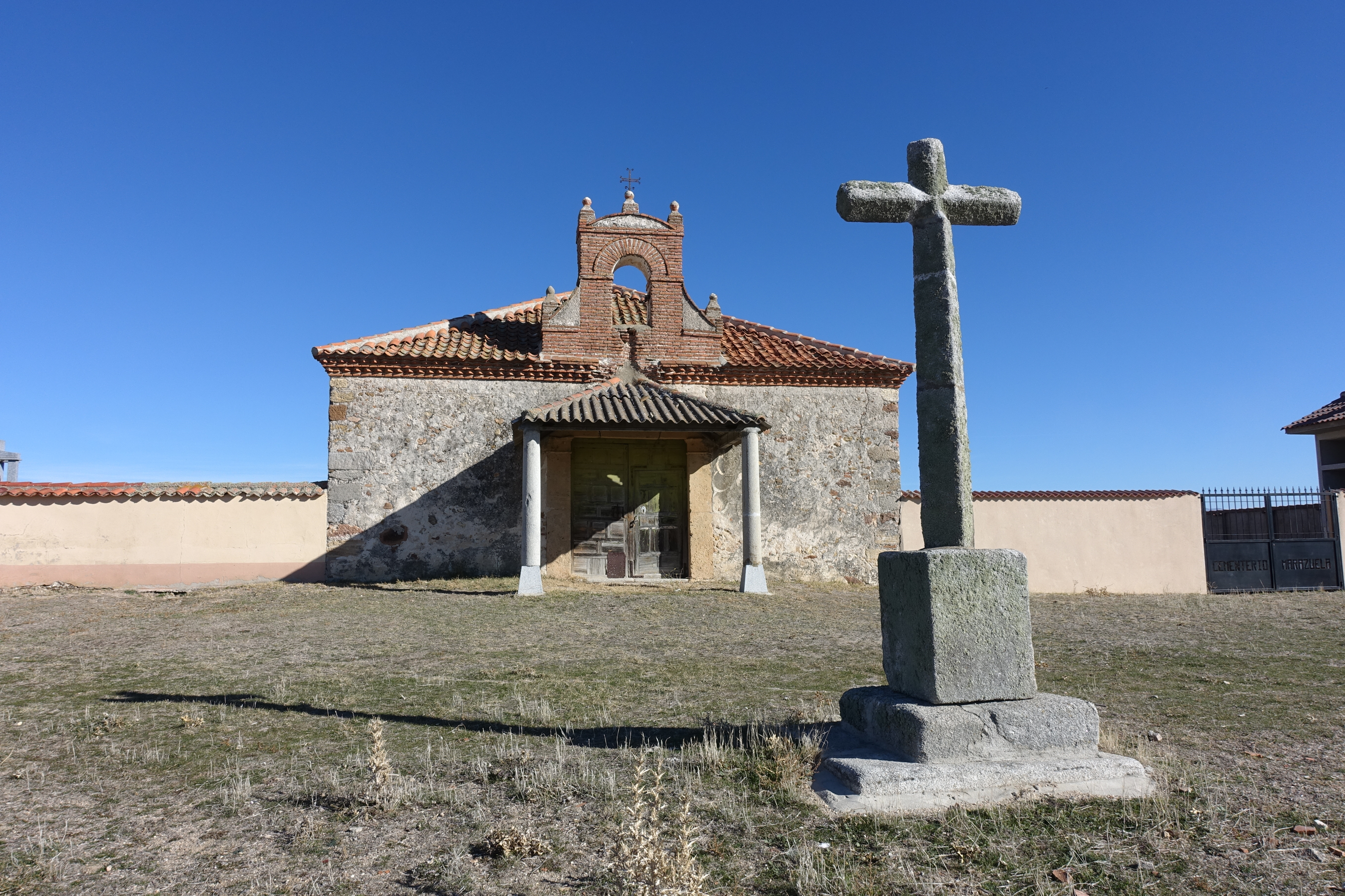 Ermita del Cristo del Humilladero, Marazuela (Segovia, España).